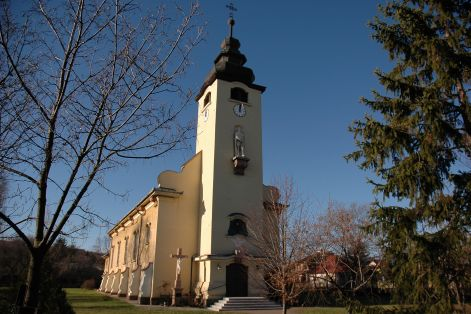 Az egri lajosvárosi Szent Lajos római katolikus templom.